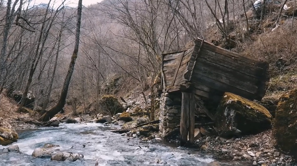 Srpski (latinica): stara vodenica na reci Rogačica